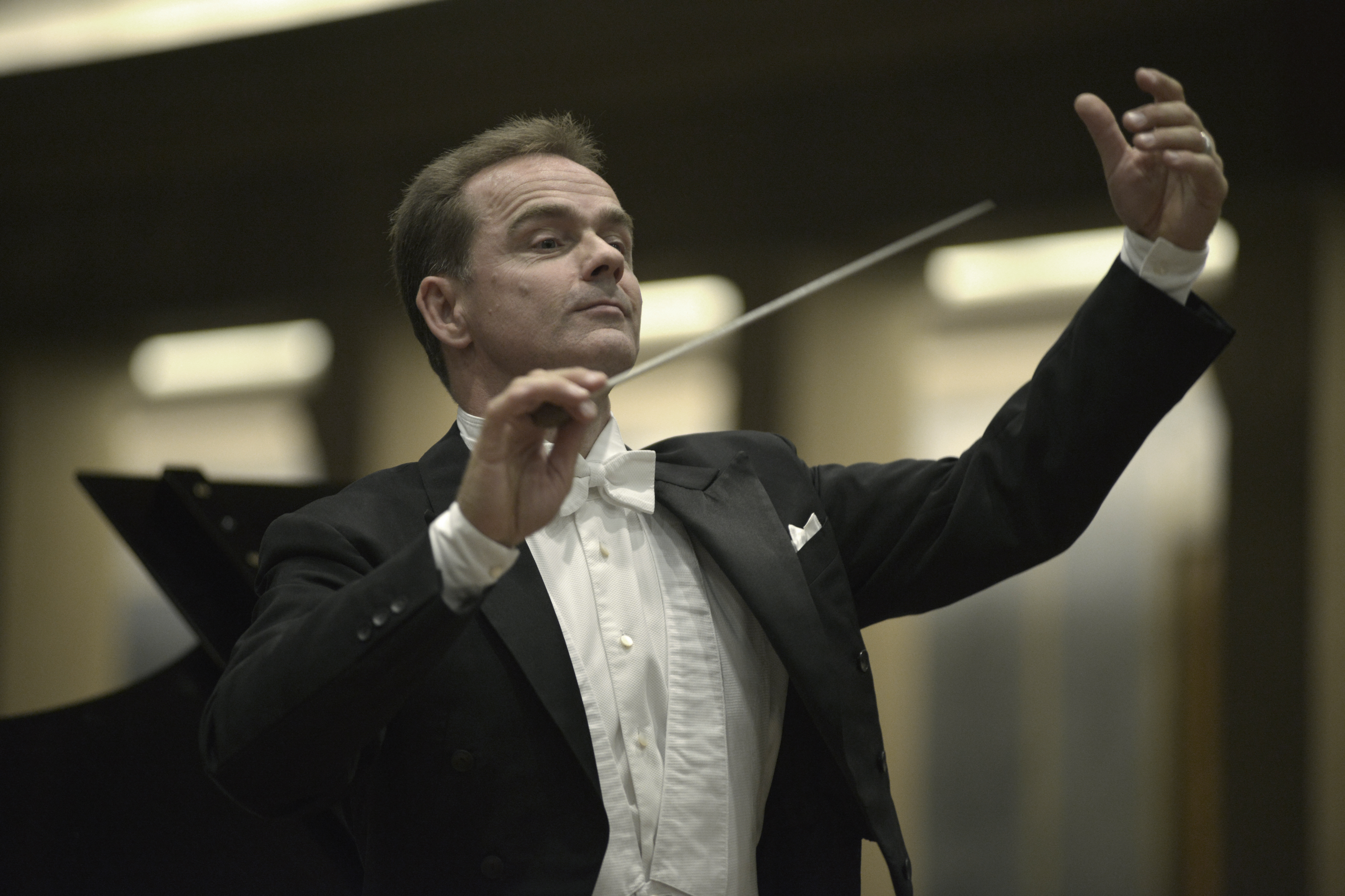 Rudolf Piehlmayer im Konzert mit der Akadamia Musicae Tokyo im Herkulessaal der Residenz in München